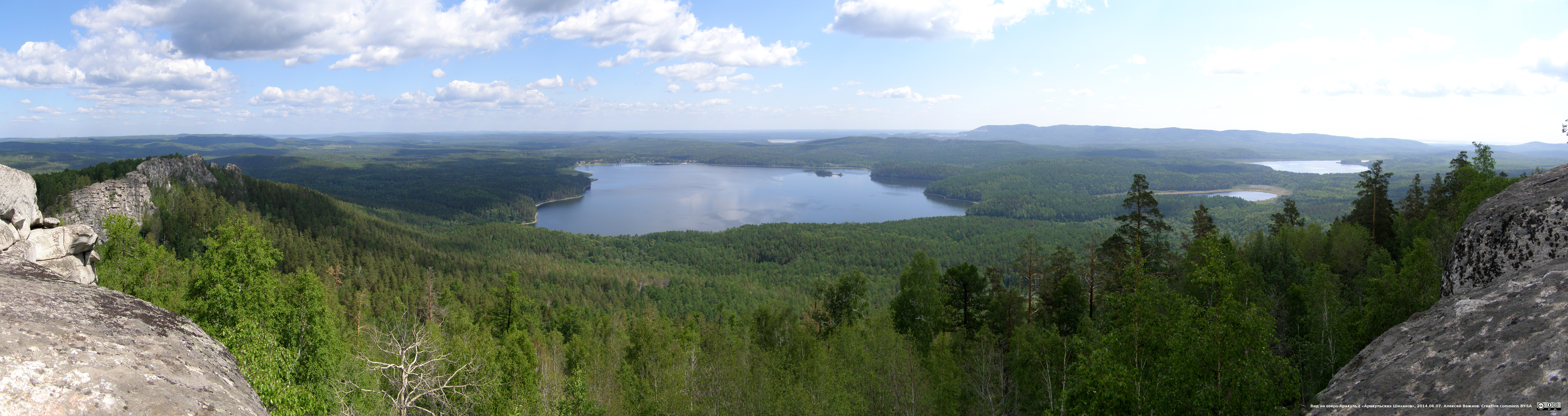 Панорамный вид на озеро Аракуль с «Аракульских Шиханов»